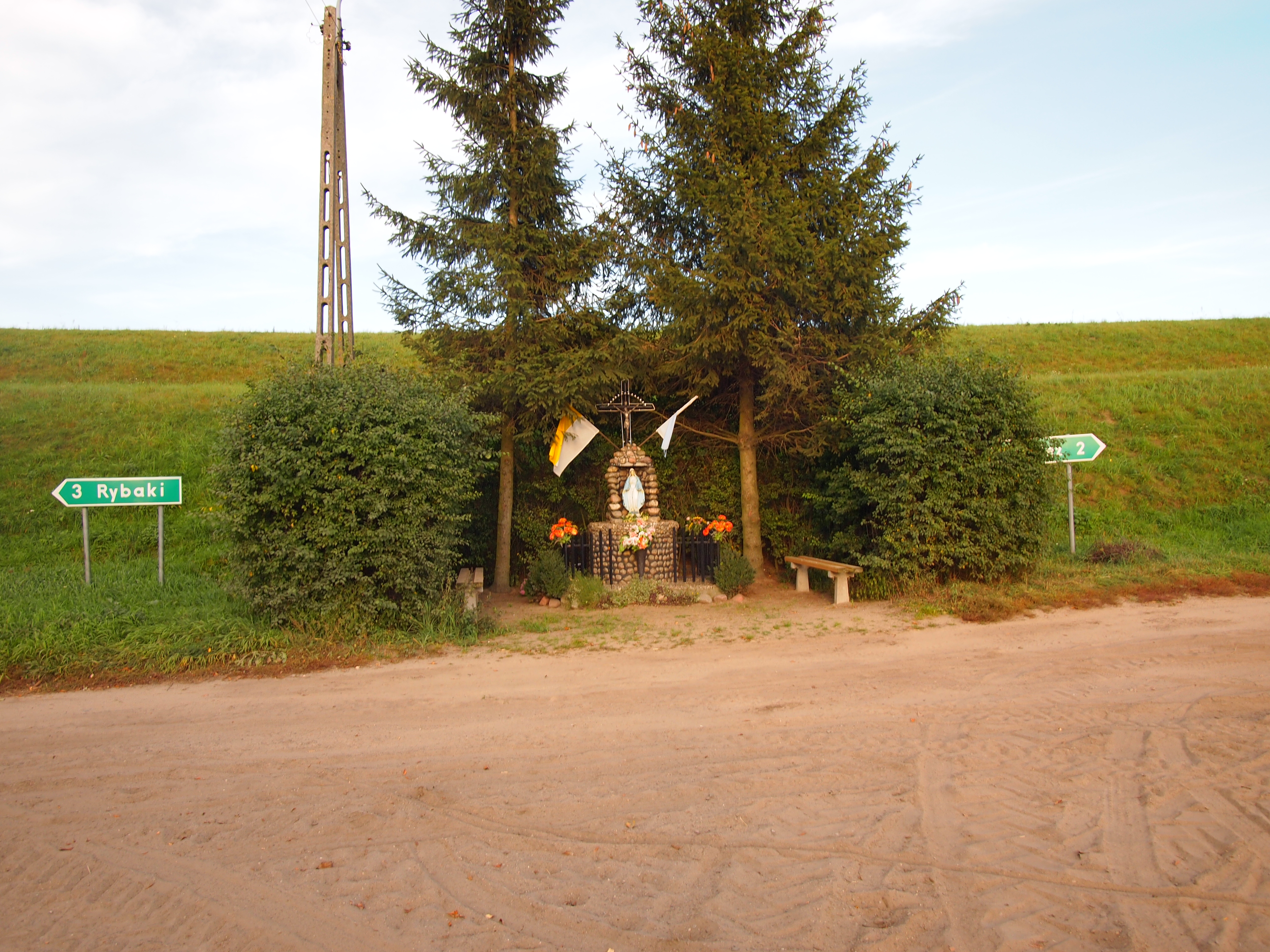 Stary Międzyłęż - kapliczka przydrożna